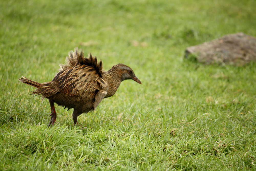 Ruffled Weka.